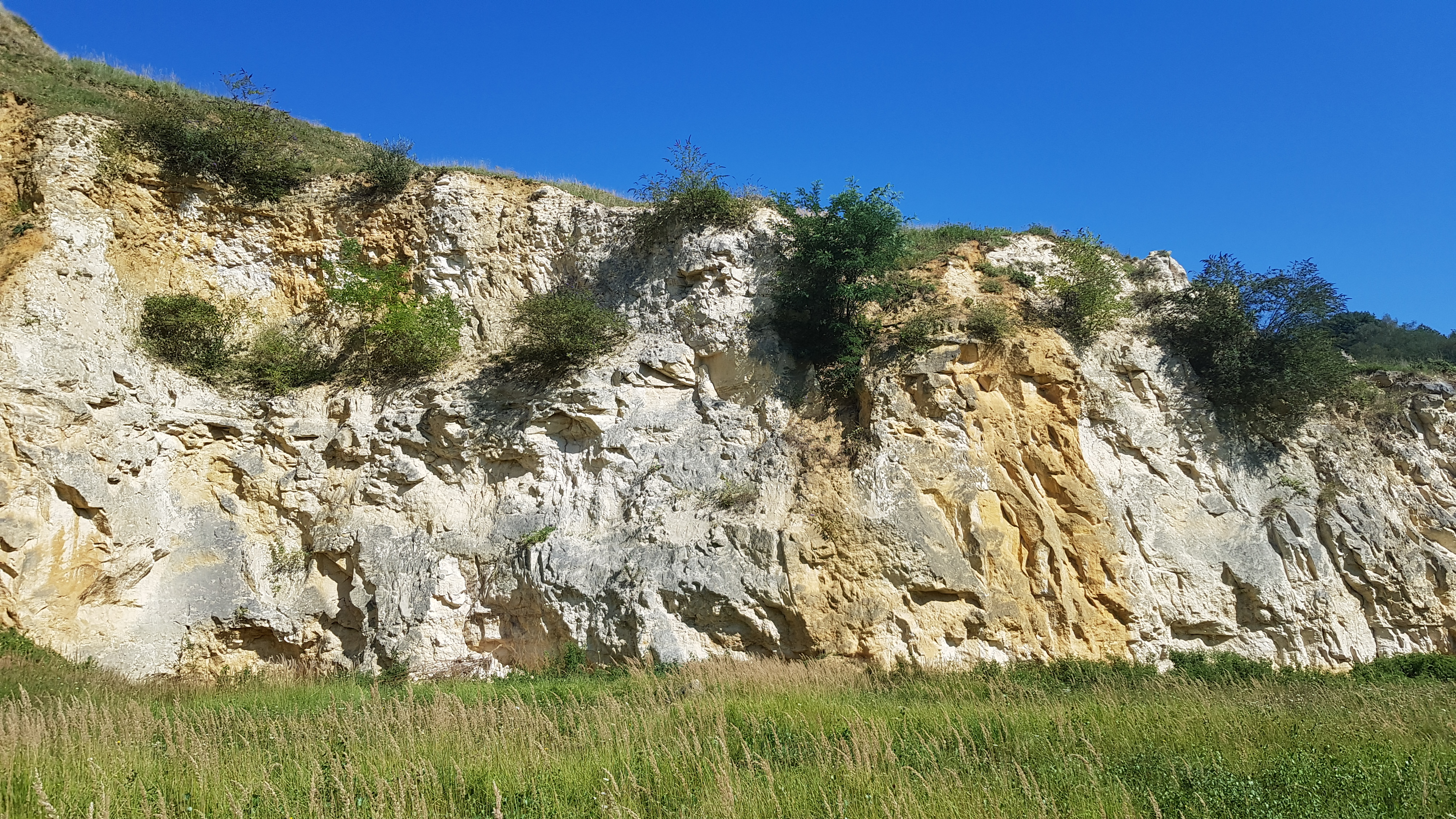 Curfsgroeve, Geulhem, Nederland